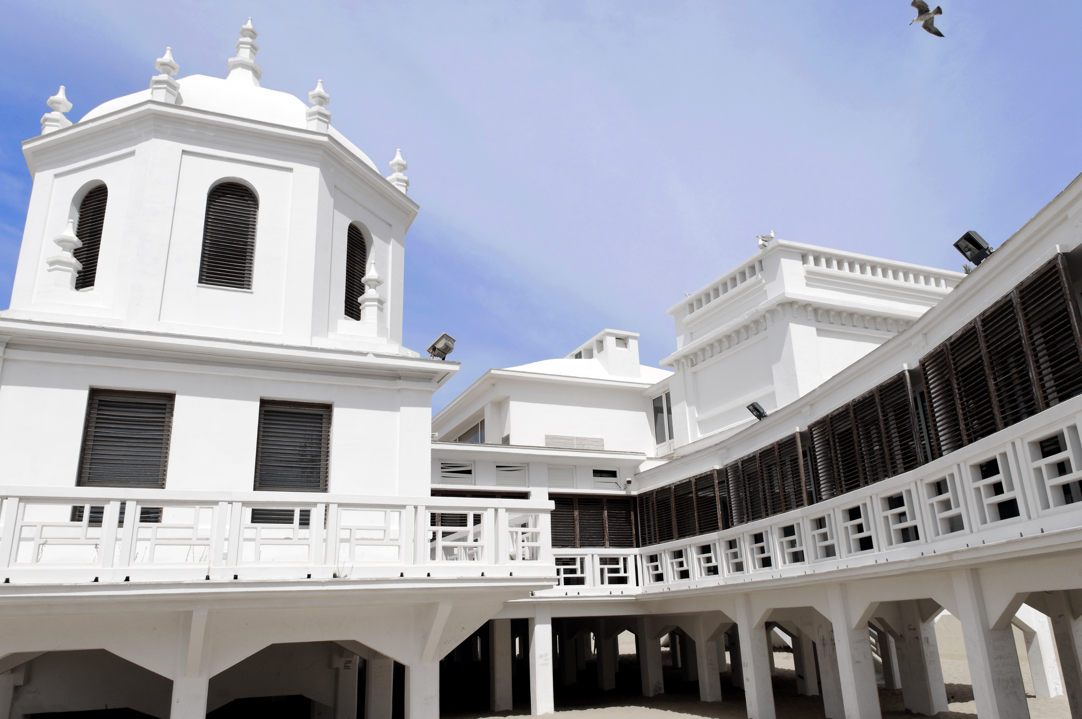 Balneario de Nuestra Señora de la Palma y del Real, Cádiz.